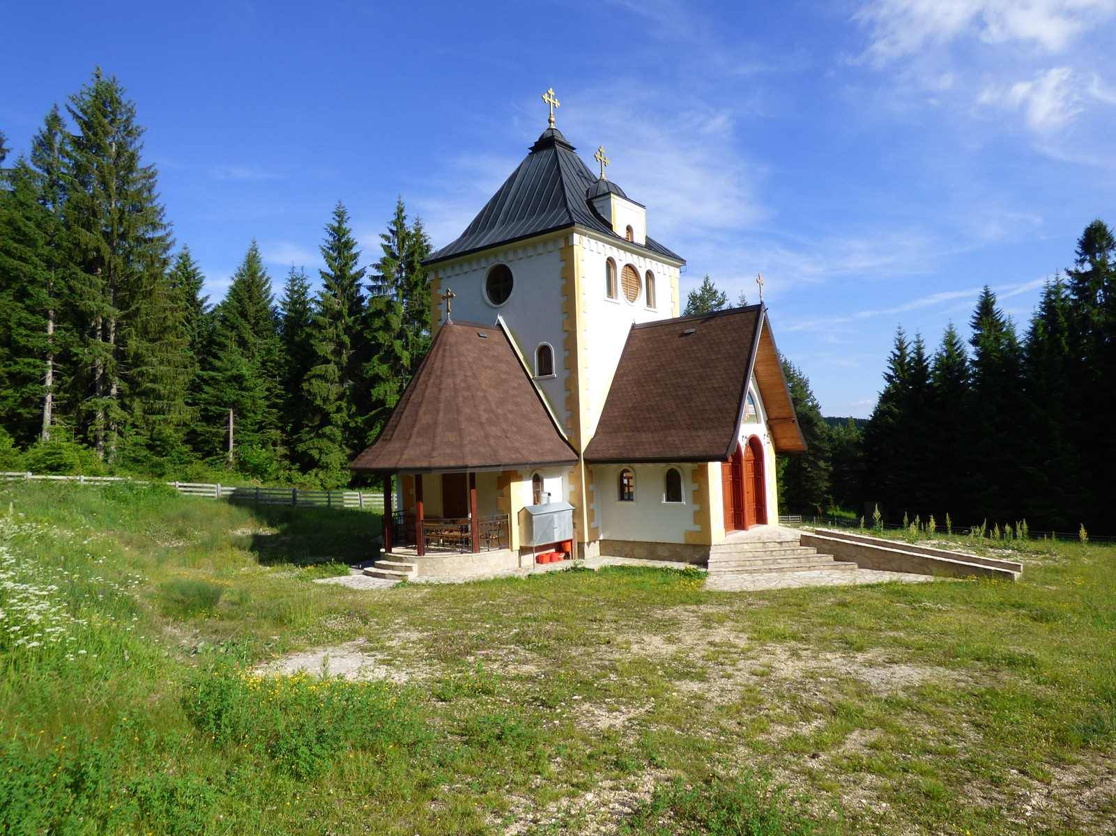 Manastir